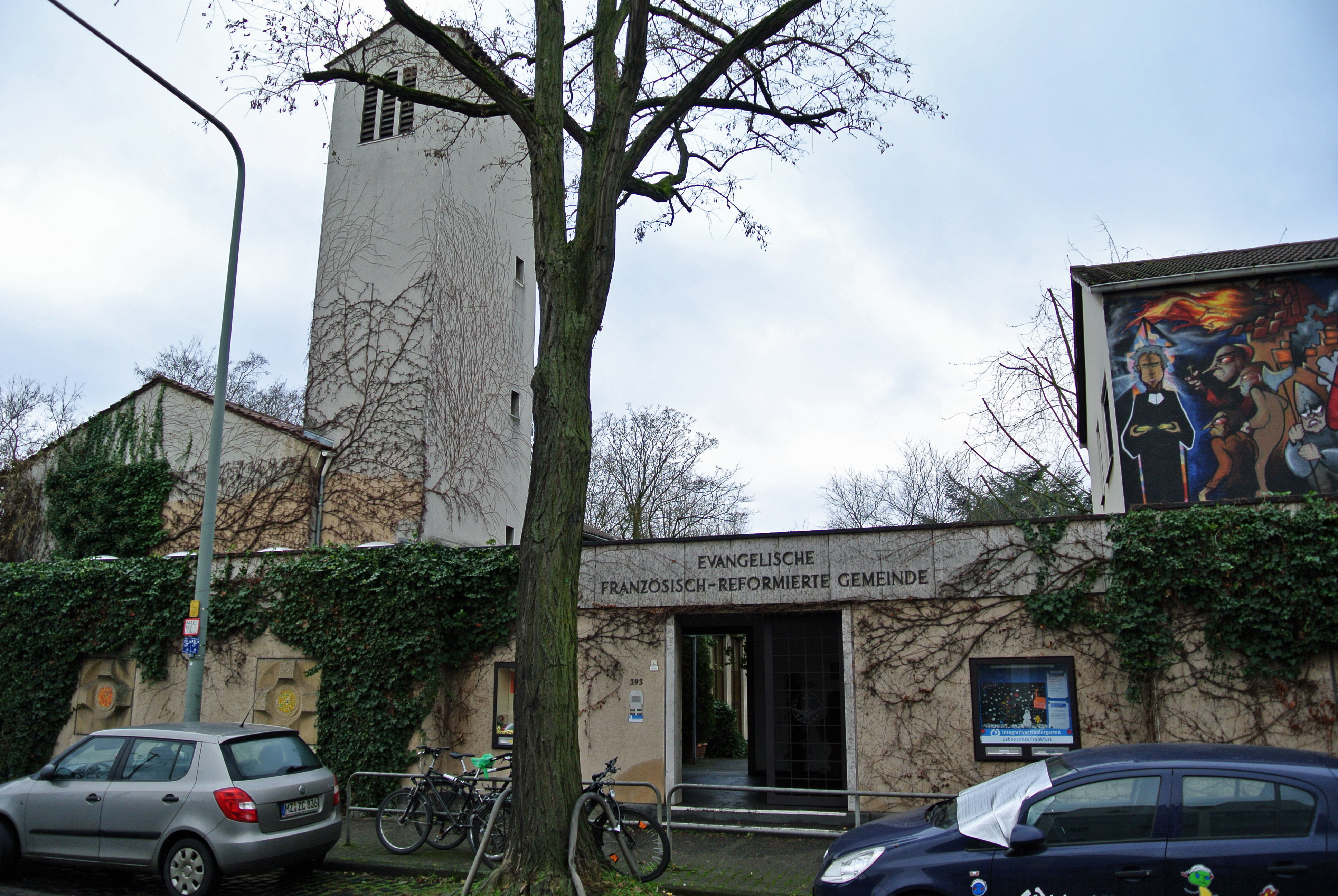 Evangelische französisch-reformierte Kirche in Frankfurt-Dornbusch, Eschersheimer Landstraße 393; Baujahr 1951; Architekt: Georg Scotti; Ersatzgebäude anstelle der kriegszerstörten innerstädtischen Kirche